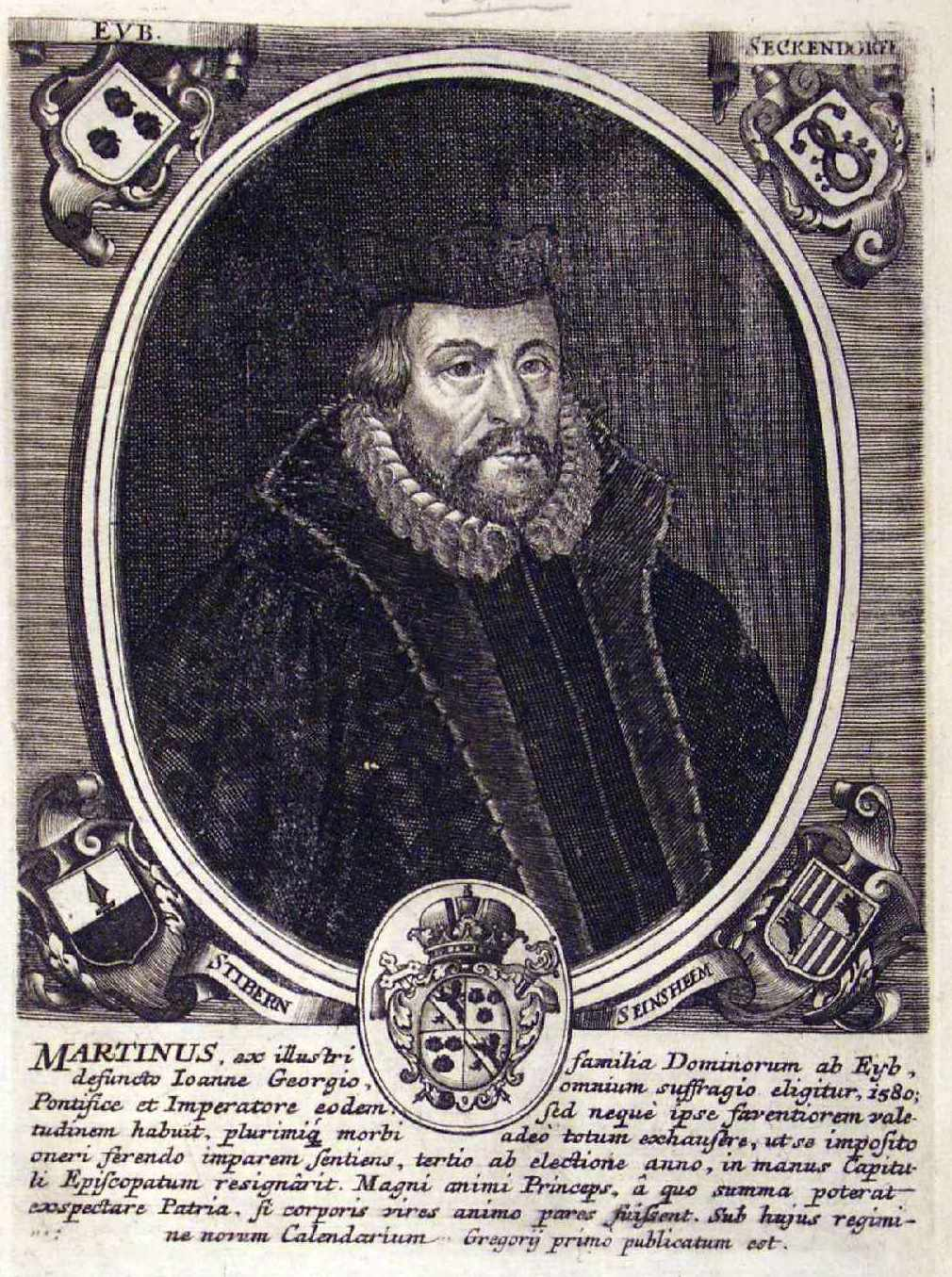 Martin von Eyb